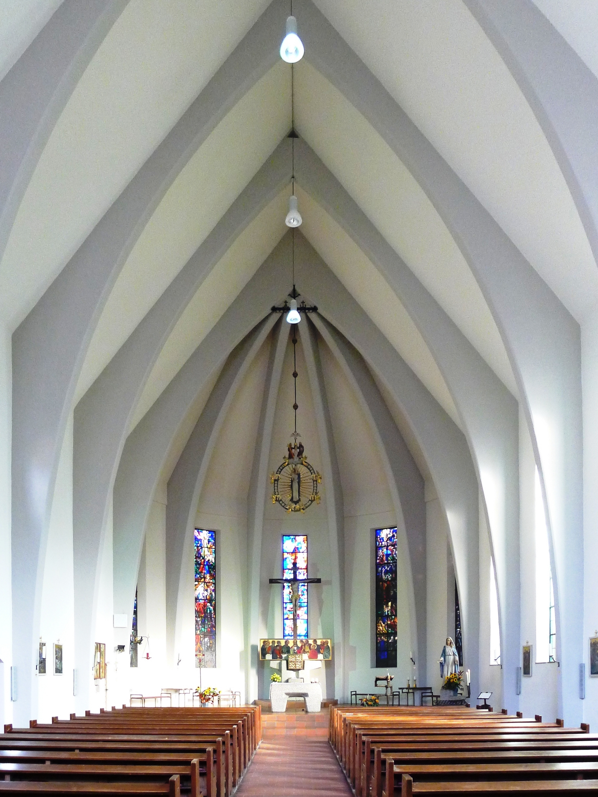 Kirchenraum Blick Richtung Apsis